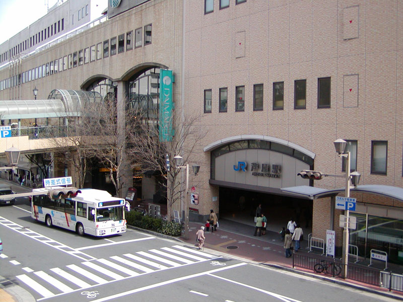 JR芦屋駅 北出口。 2007年4月、兵庫県芦屋市の同駅で投稿者が撮影。 Category:鉄道駅画像 Category:兵庫県の画像